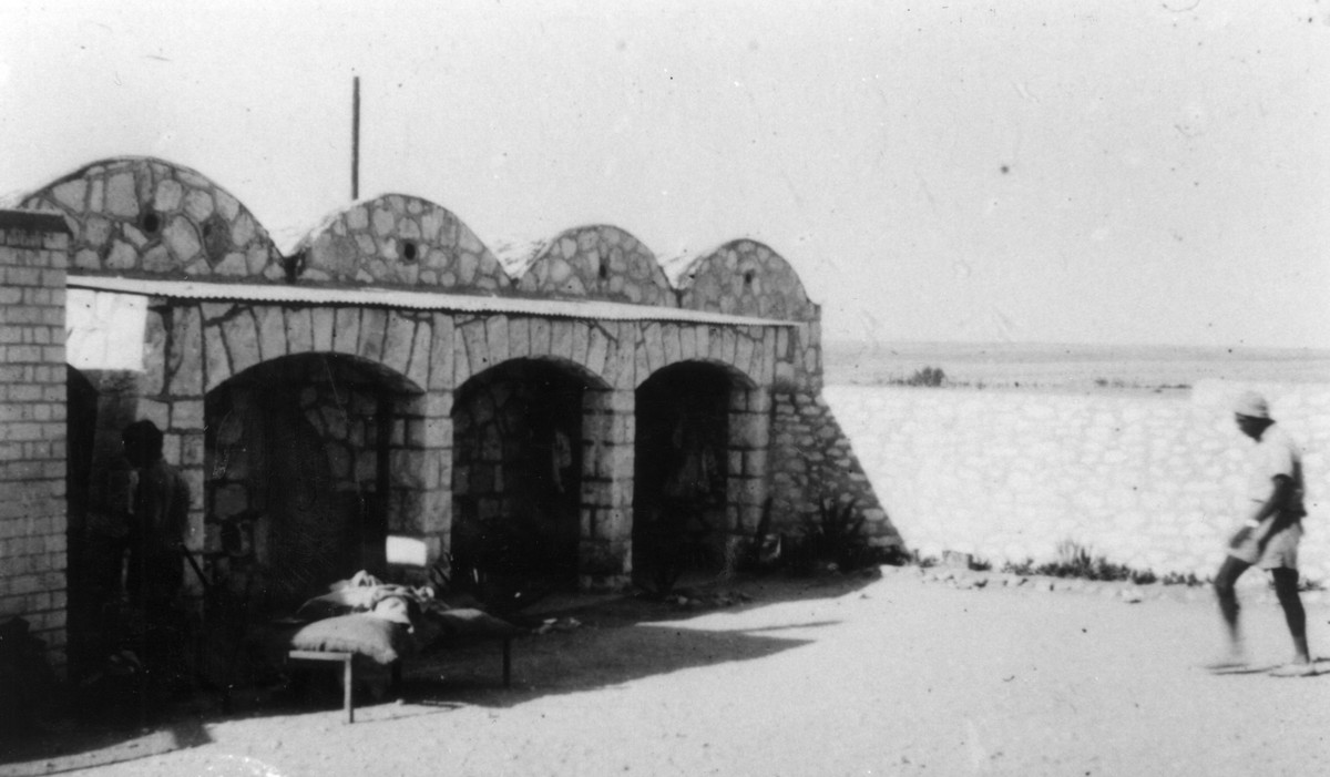 חטיבת יפתח - הגדוד השלישי - 1 - במסעות - במסע הגדול - רביבים